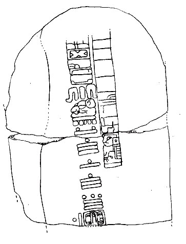 Estela C de Tres Zapotes (encontrada en el Cerro de las Mesas al oeste de las montañas de Tuxtla, Veracruz) Es uno de los primeros documentos escritos de América. Concretamente data del periodo llamado Olmeca III (tardío), aproximadamente al comenzar nuestra era: la famosa Estela «C» de Tres Zapotes (México) contiene la fecha equivalente al 2 de septiembre del año 31 dC